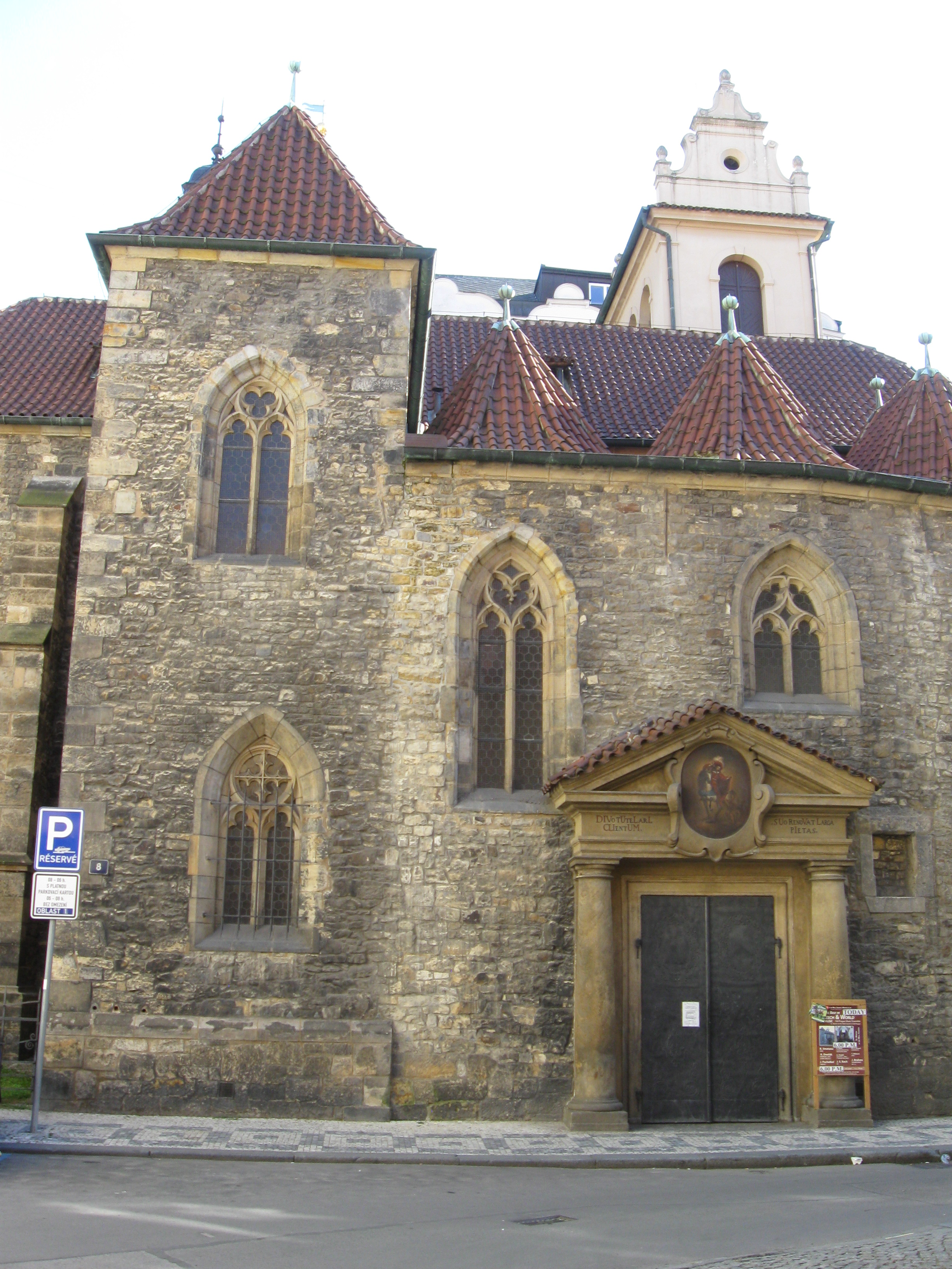 Kostel sv. Martina ve zdi (Staré Město), Praha 1, Martinská, Staré Město